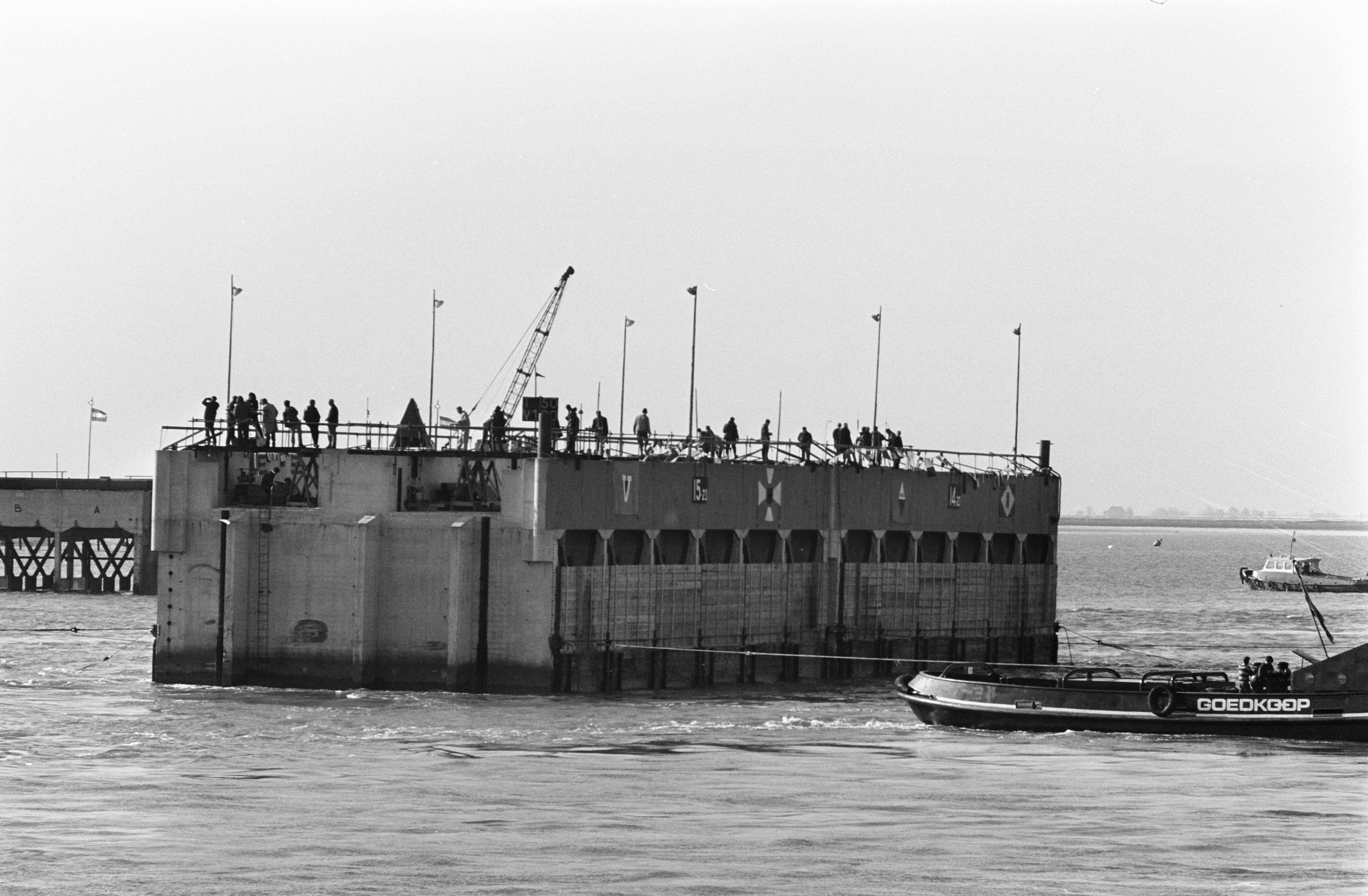 Collectie / Archief : Fotocollectie Anefo Reportage / Serie : [ onbekend ] Beschrijving : koningin Juliana aanwezig bij afsluiten van de Lauwerszee het laatste caisson wordt ingevaren door sleepboten Datum : 23 mei 1969 Locatie : Lauwerszee Trefwoorden : SLEEPboten, caissons, koninginnen Persoonsnaam : Juliana (koningin Nederland) Fotograaf : Koch, Eric / Anefo Auteursrechthebbende : Nationaal Archief Materiaalsoort : Negatief (zwart/wit) Nummer archiefinventaris : bekijk toegang 2.24.01.05 Bestanddeelnummer : 922-4515